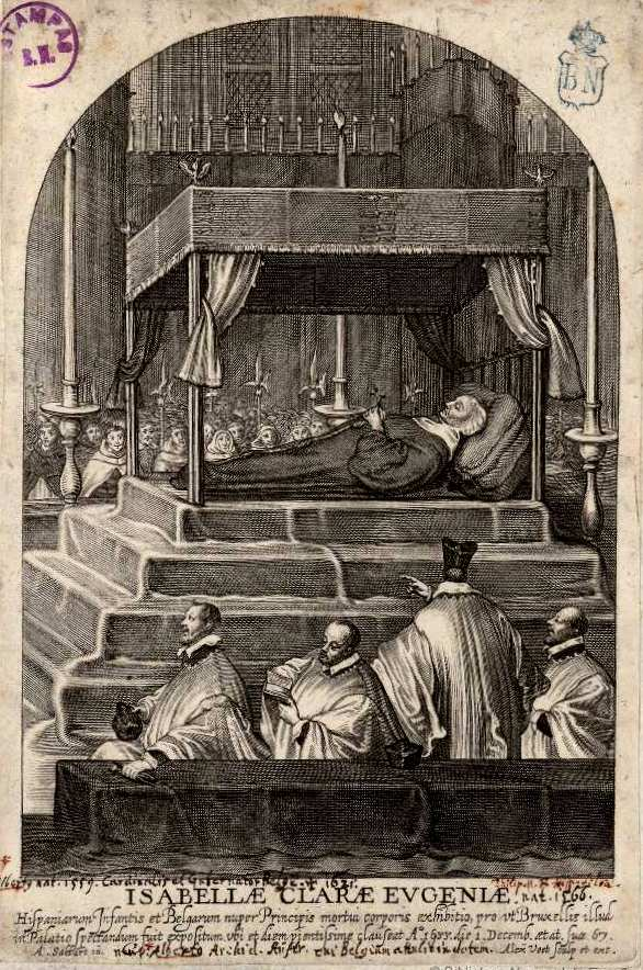 Exequias de Isabel Clara Eugenia, grabado a buril de Alexander Voet por dibujo de Anton Sallaert, firmado "A. Sallart in. Alex Voet sculp et excud". Biblioteca Nacional de España